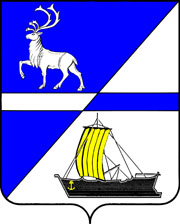 Герб Дудинки